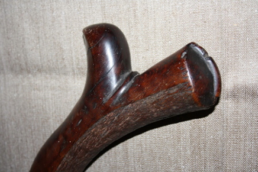 casse-tête fidjien Gata waka